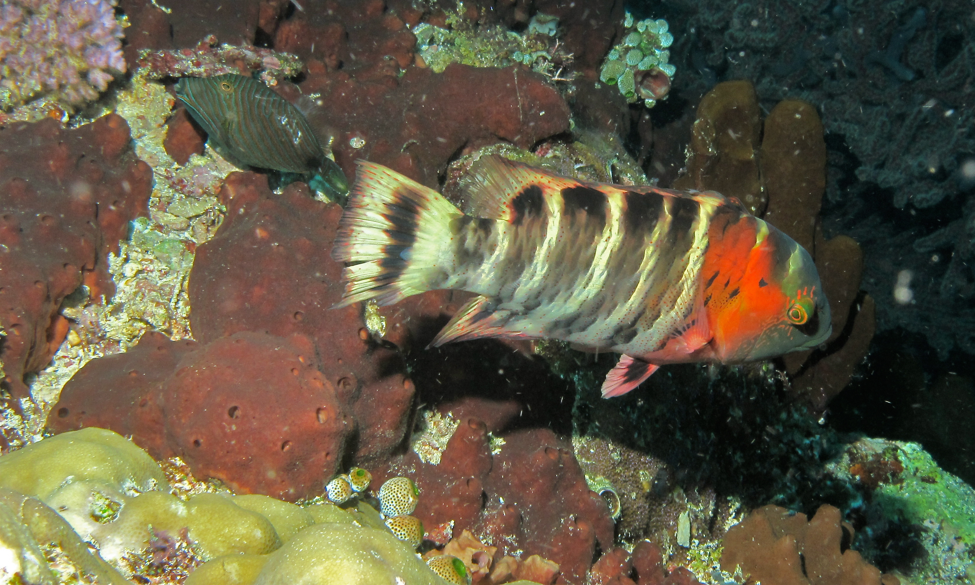 Muka, Bunaken Island, Sulawesi, INDONESIA